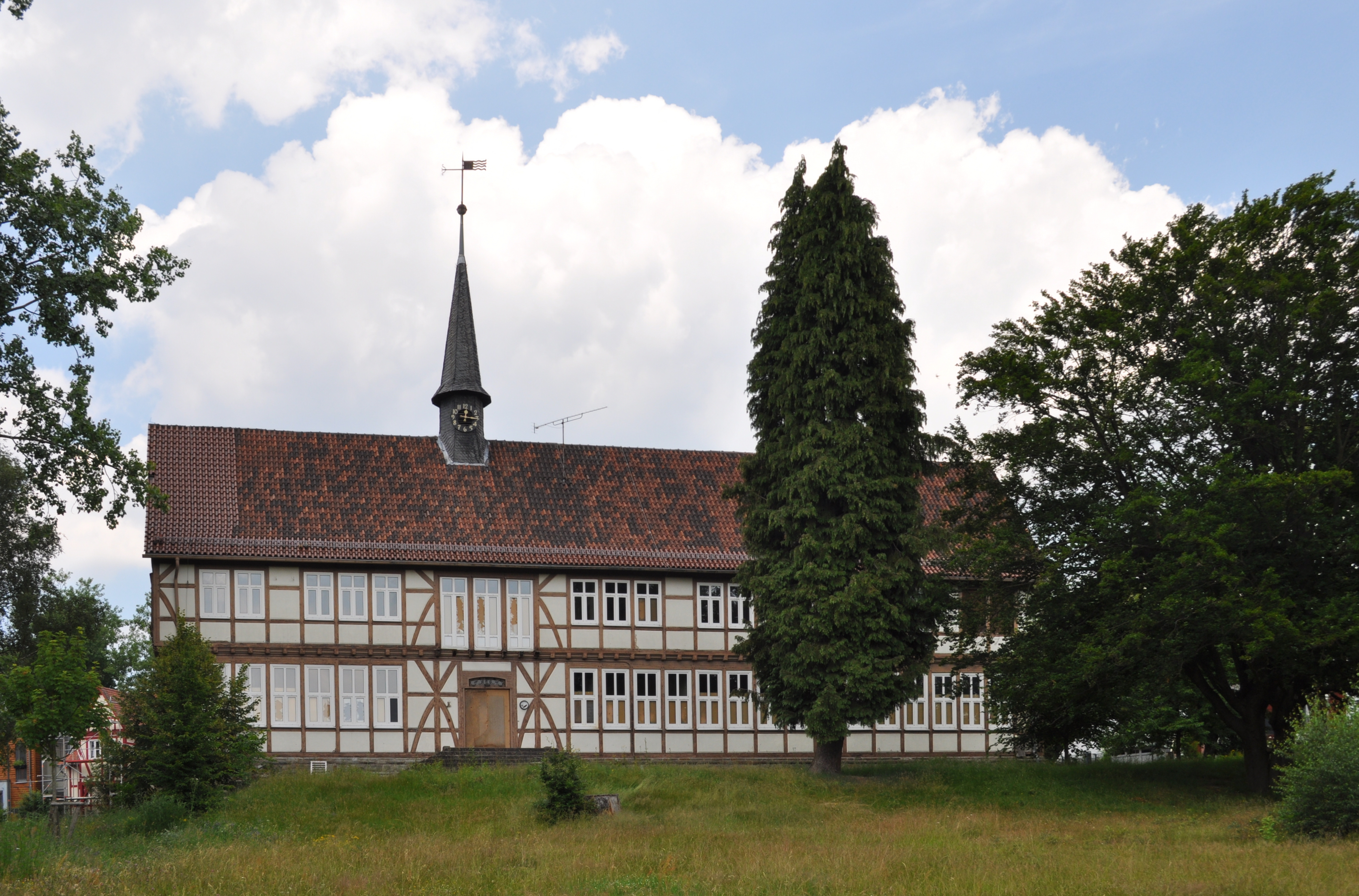 Oberstedten, Heinrich-Kappus-Weg 17